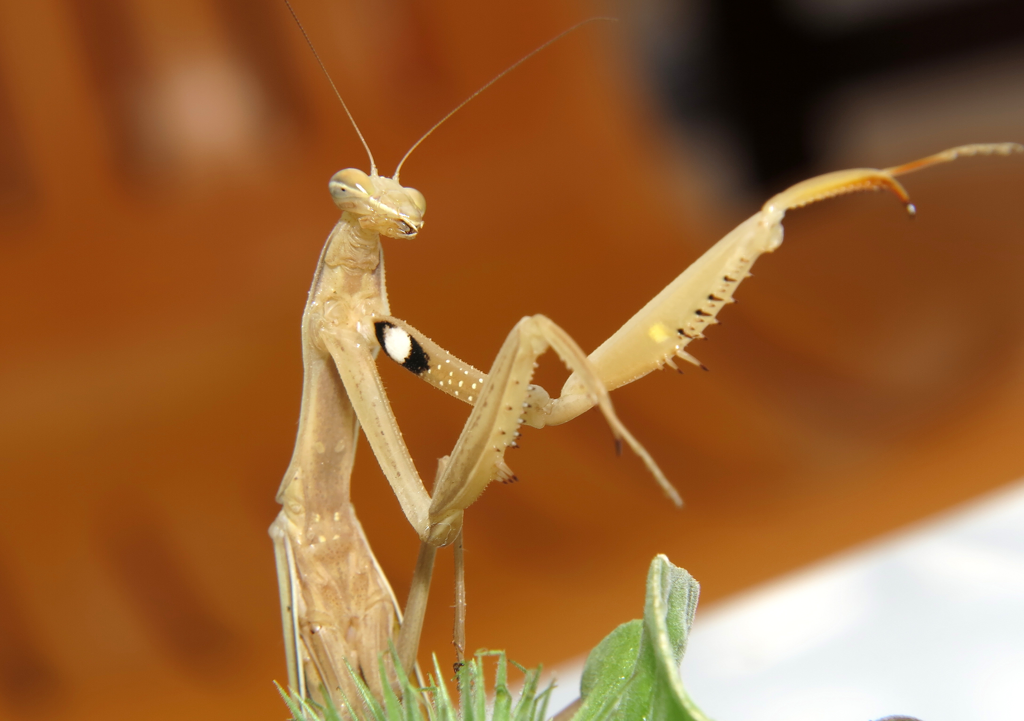 1-IMG_3777